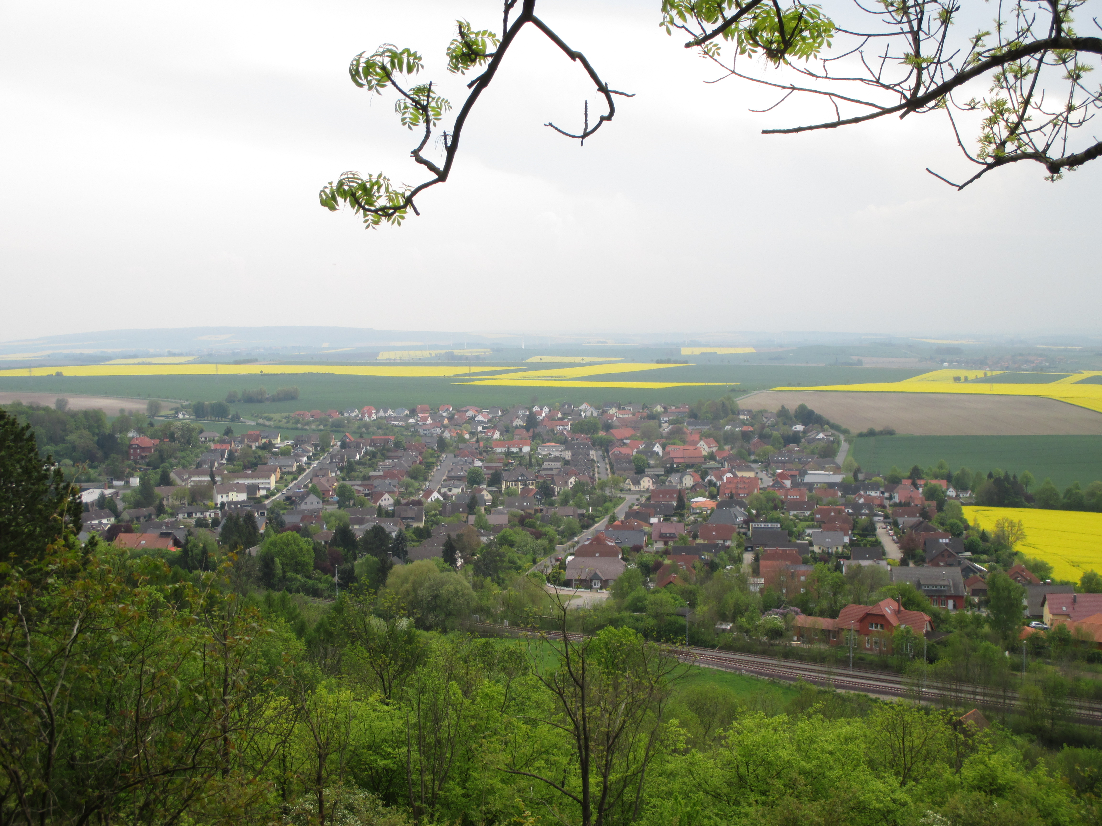 Blick auf Wittmar vom Südrand der Asse, Landkreis Wolfenbüttel